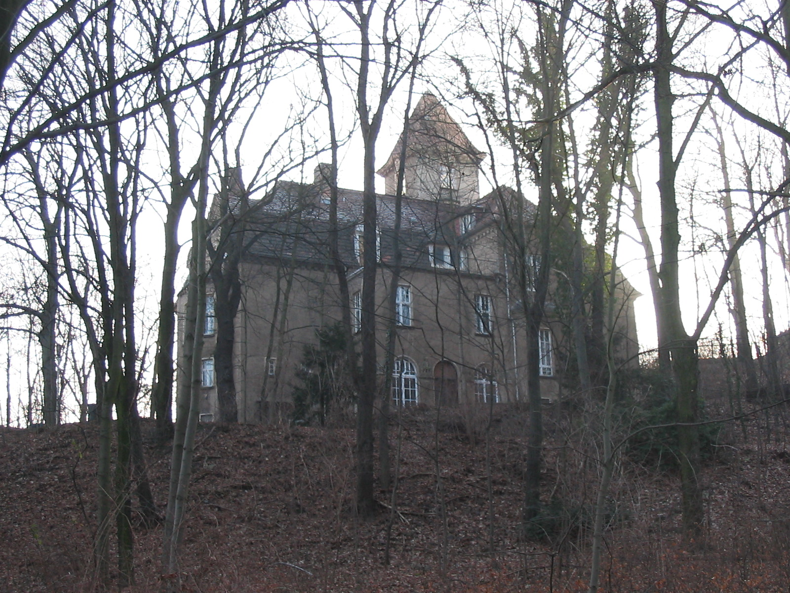 Radebeul Meyerburg von Norden